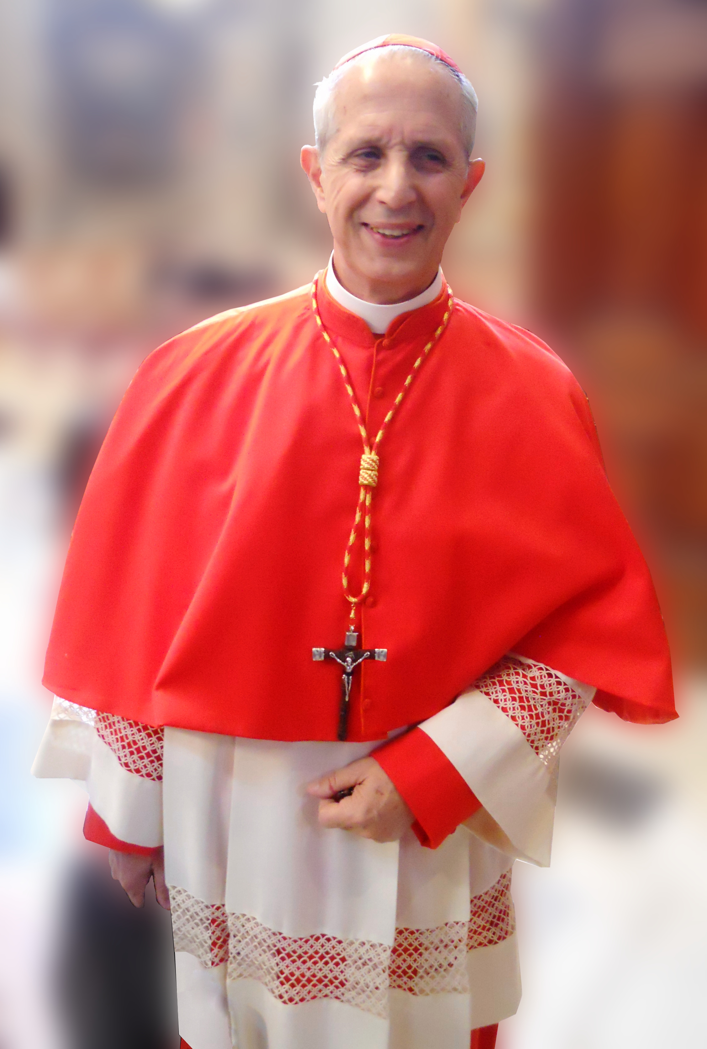 Mario Aurelio Cardinal Poli